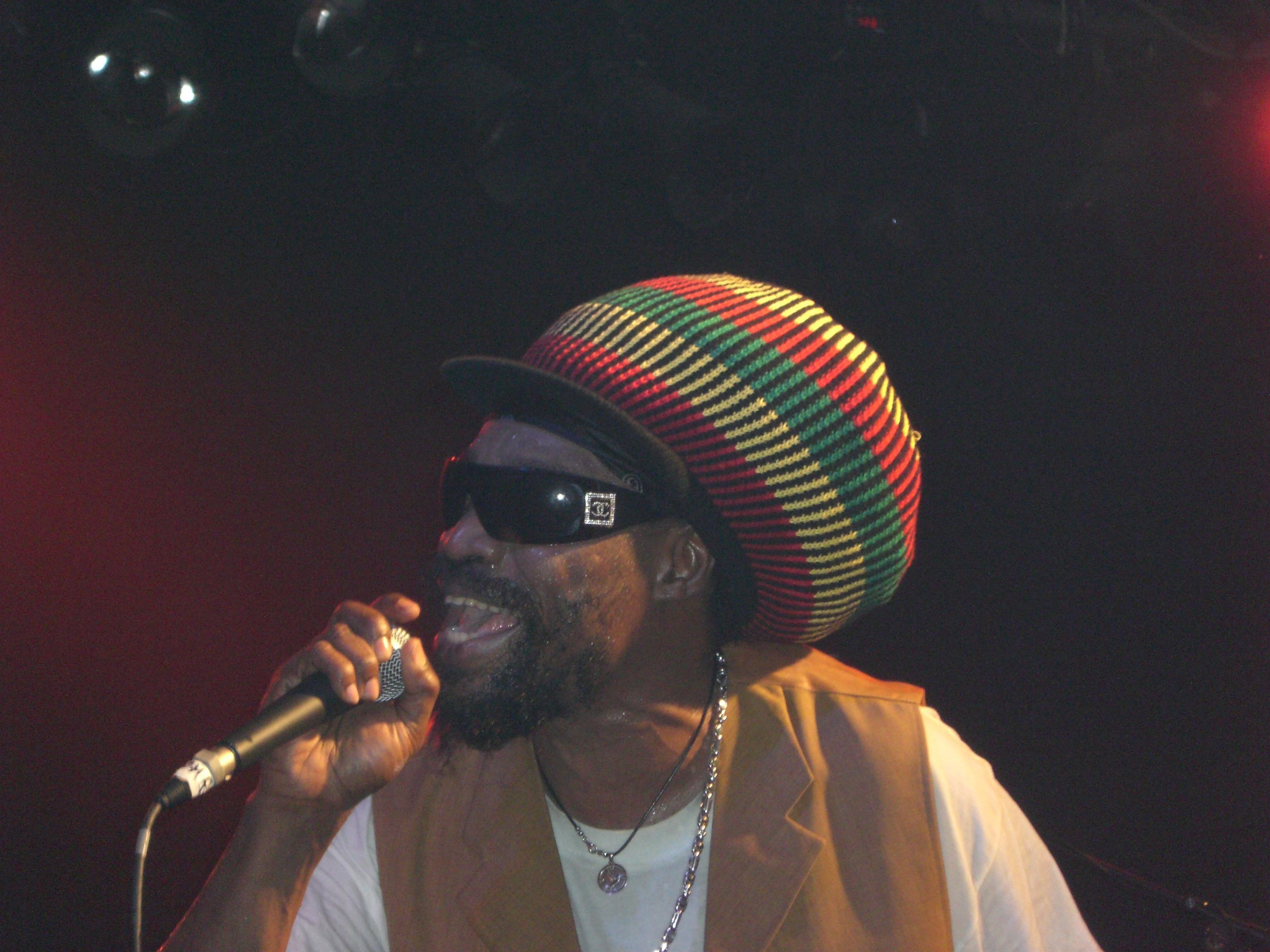 Michael Rose auf der Black Uhuru Tour 2007 in Dortmund